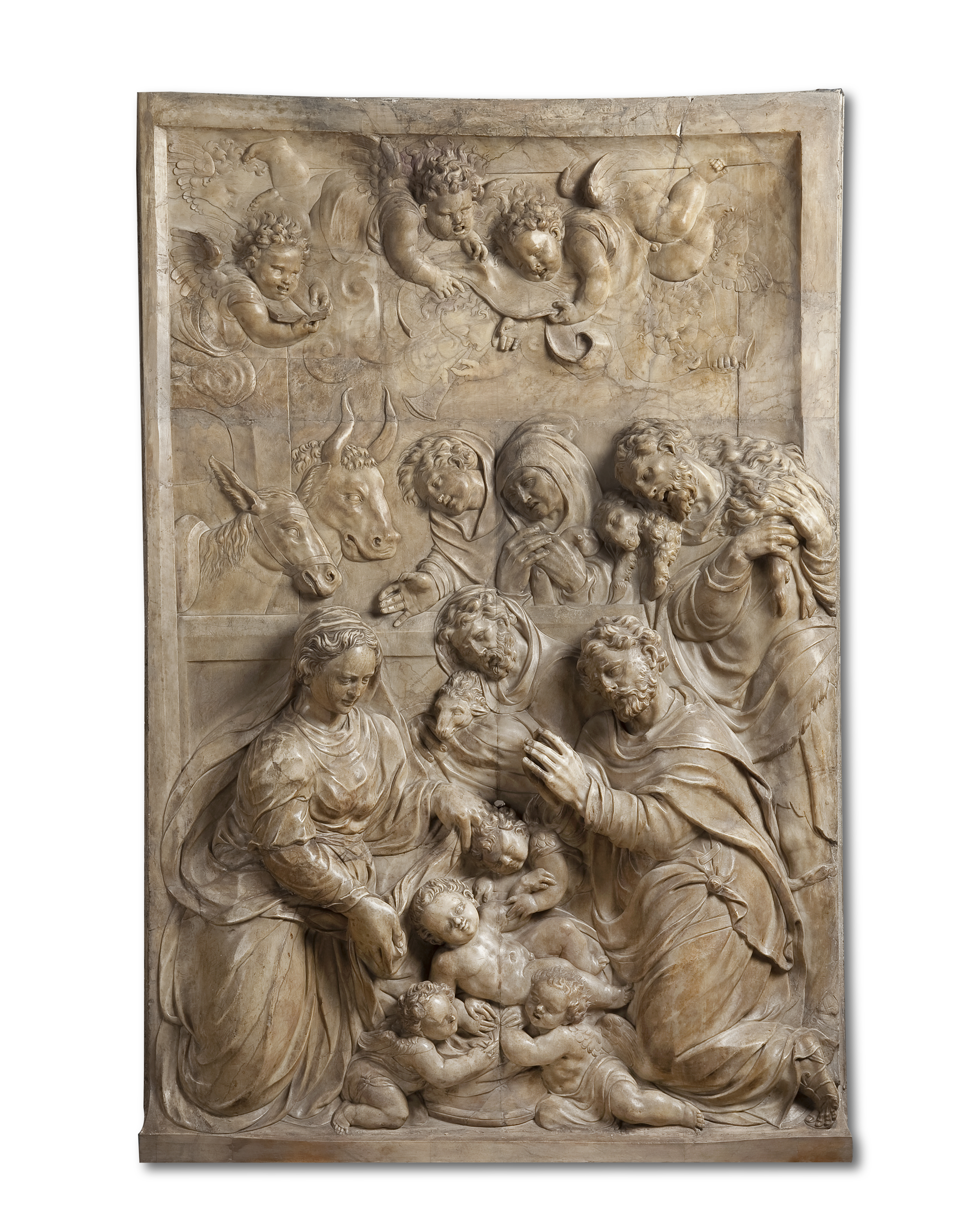 Relleus vida de la Verge - Adoració pastors